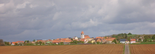 village de Minversheim